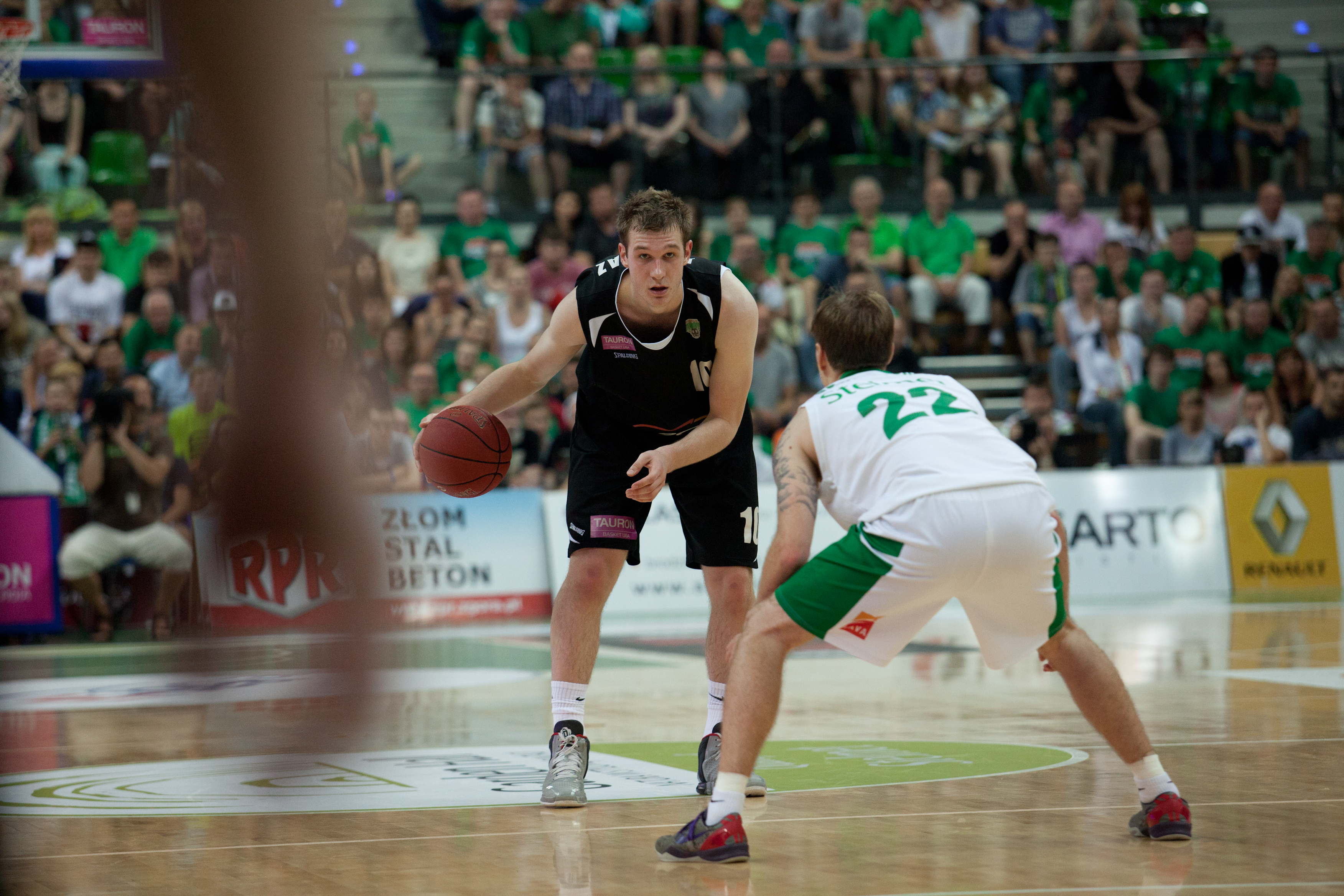 Nemanja Jaramaz PGE Turów Zgorzelec